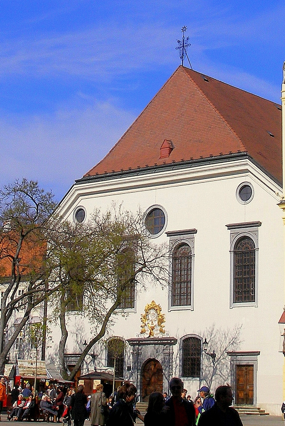 Jezuitský kostol na Františkánskom námestí v Bratislave.